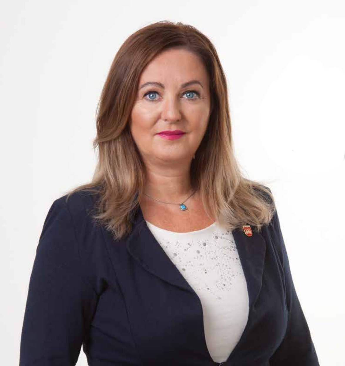 MUDr. Iveta Plšeková